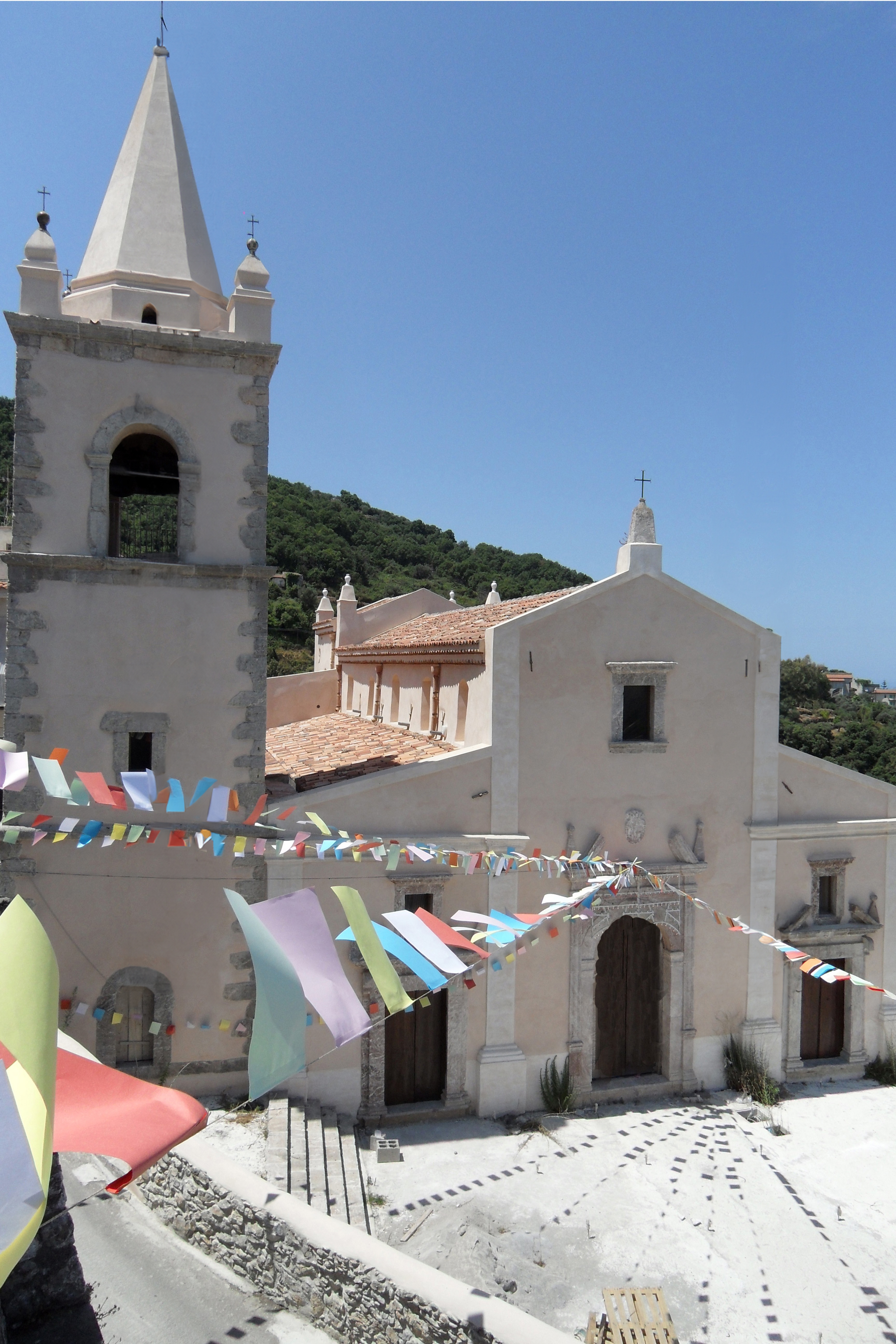 Chiesa Annunziata, Capri Leone